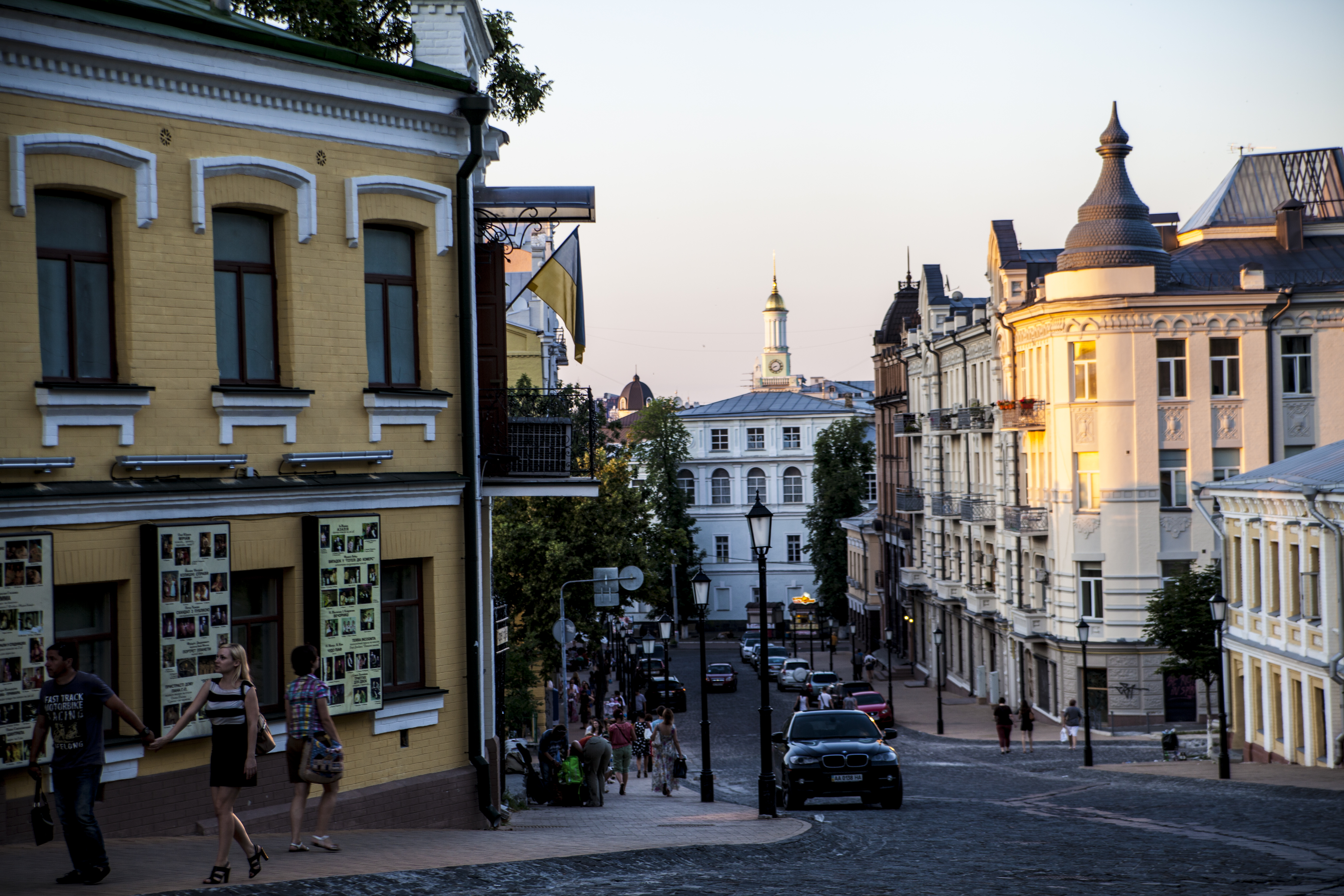 1914 р